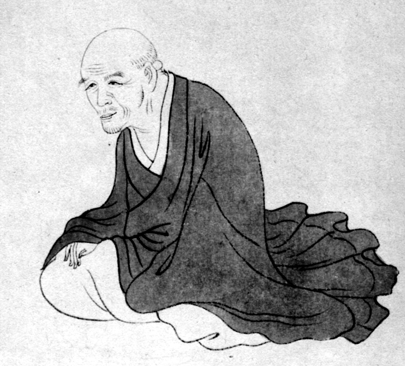 博美社『國文学名家肖像集』1939.5.25より。